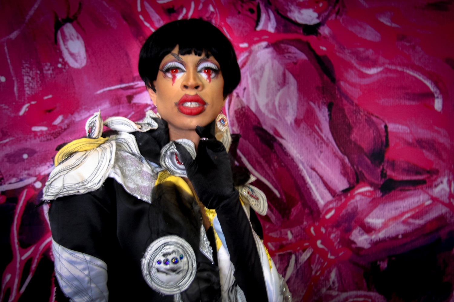 Rupaul DragCon 2019 - Los Angeles